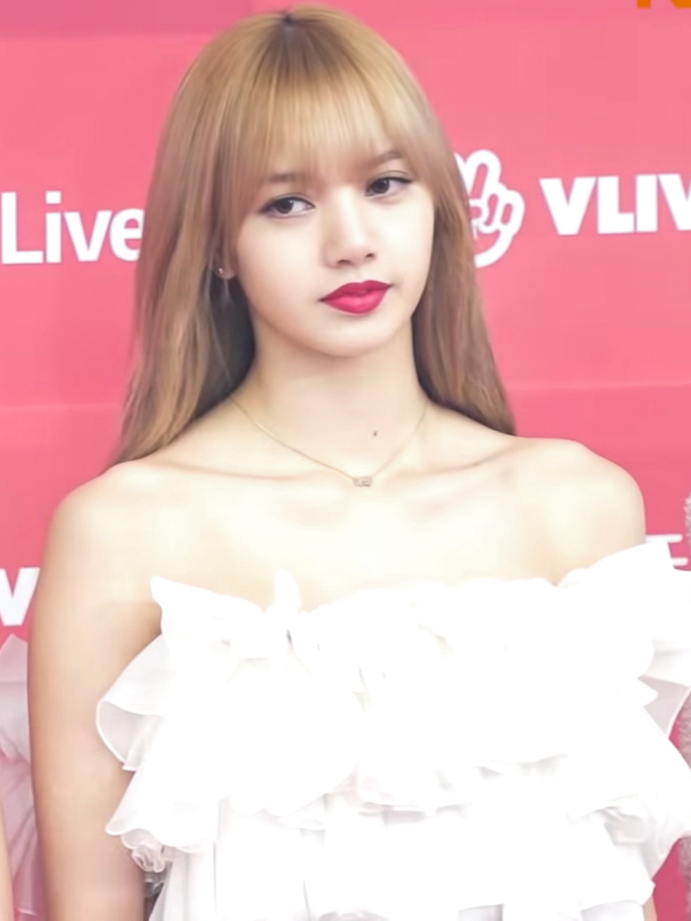 20190106 (NEWSEN) 블랙핑크(BLACKPINK), 수줍은 많은 소녀지만 돋보이는 아름다운 미모 (Glden Disc Awards 2019)